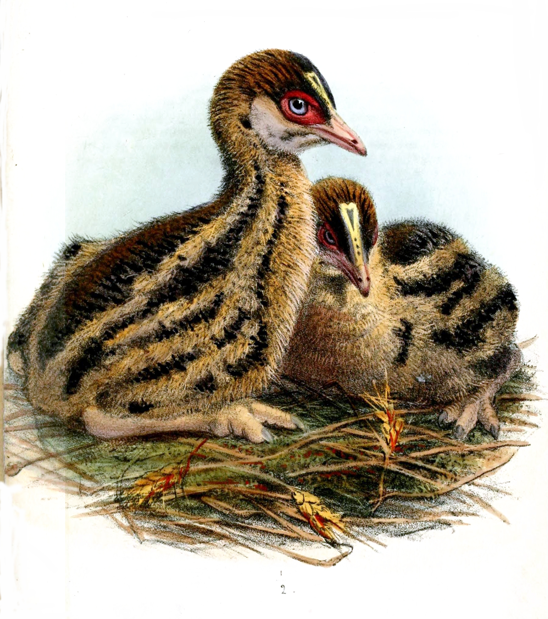 Casuarius bennetti chick